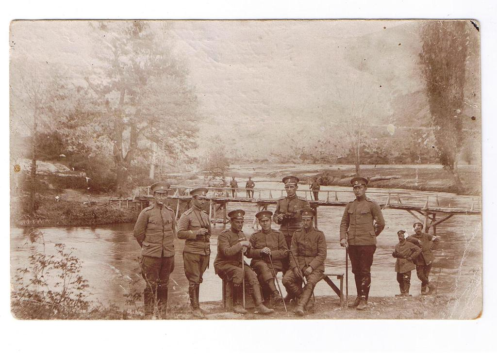 Български военни на река Черна през 1917 година.